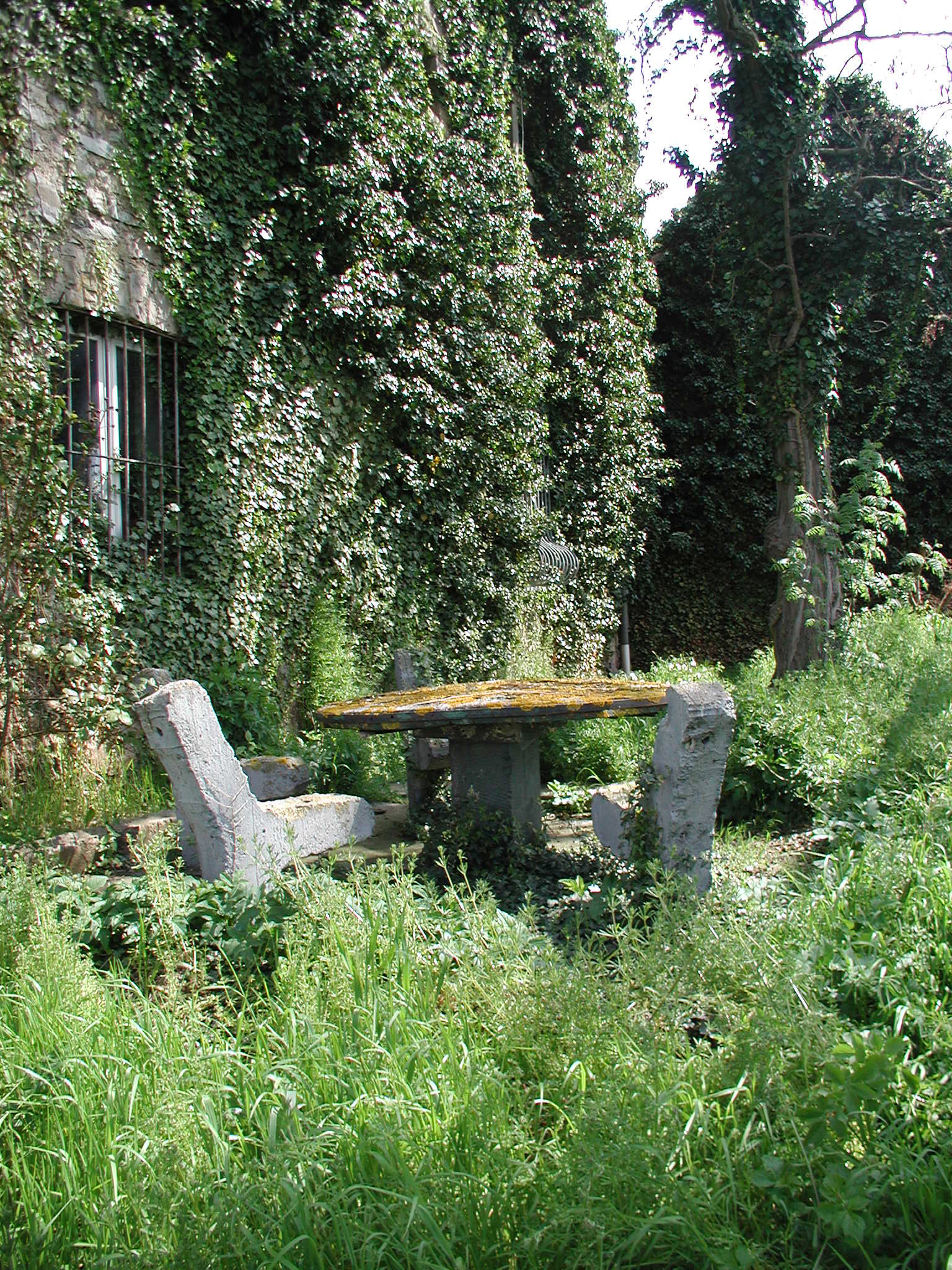 Arloff, Burggarten (Tafelrunde ohne Ritter)